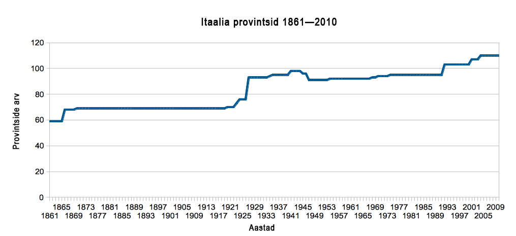 Itaalia provintside arengusuund, tõlge